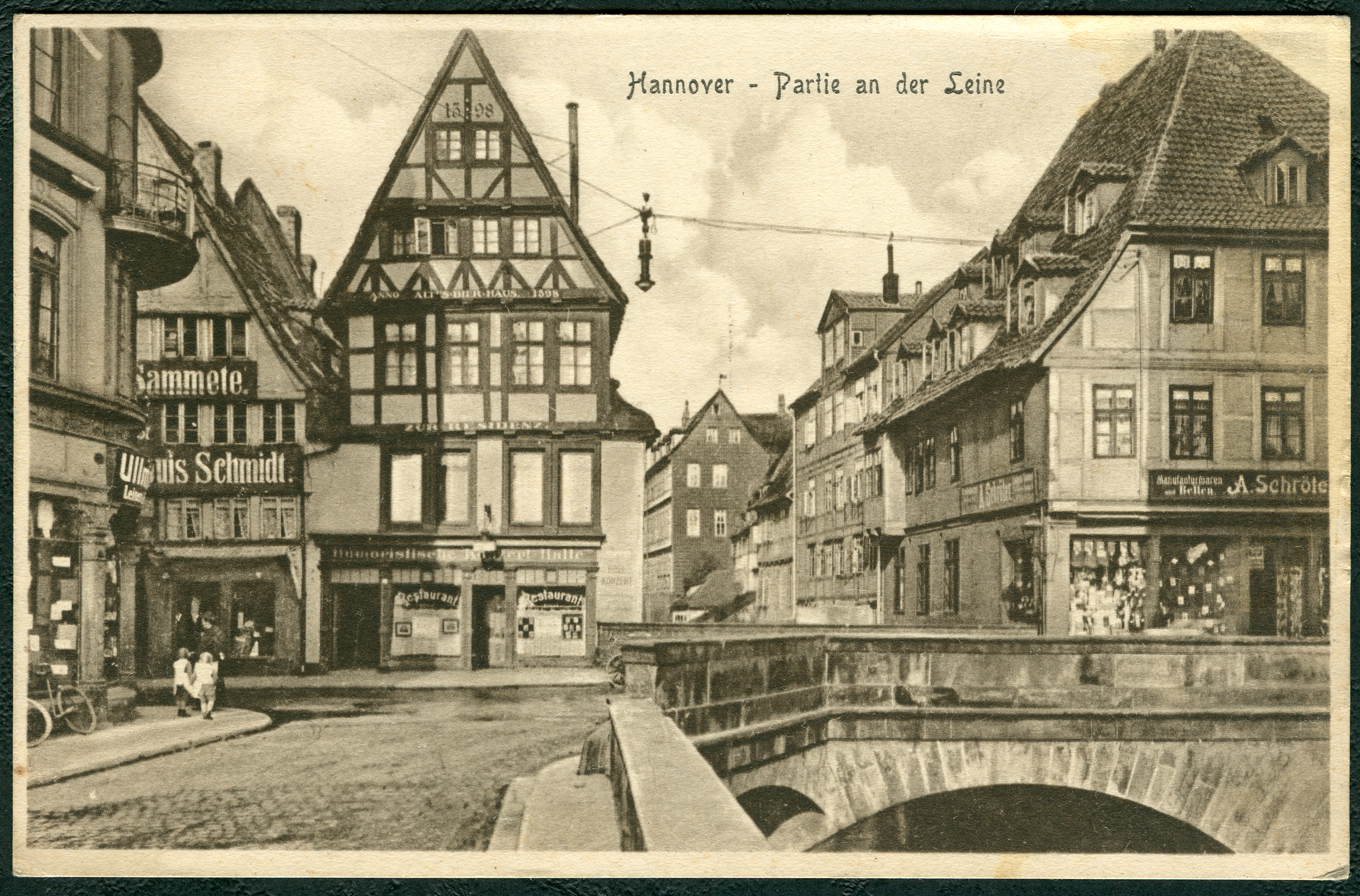 Rund um die Leintorbrücke in der Altstadt von Hannover fand sich vor den Luftangriffen auf Hannover im Zweiten Weltrkrieg eine dichte Bebauung von Fachwerkhäusern zumeist aus dem 17. Jahrhundert. Mit der Jahreszahl 1598 versehen ist das Fachwerkgebäude links der Bildmitte: Das Restaurant Alt's Bier-Haus zur Residenz lockte seine Gäste mit freien Konzerten in seiner "humoristischen Konzert-Halle". Links daneben fand sich das um 1540 errichtete und noch in der ersten Hälfte des 20. Jahrhundert erhaltene Fachwerkhaus unter der Adresse Ernst-August-Straße 2 Ecke Rademacherstraße, das als Sammethaus Louis Schmidt als Deutschlands größtes Versandhaus insbesondere für Lindener Samt auch eine Filiale in Köln unterhielt ...